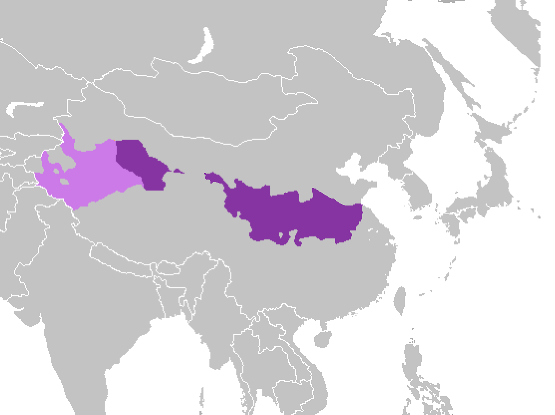 Mayoría de habantes Minorías